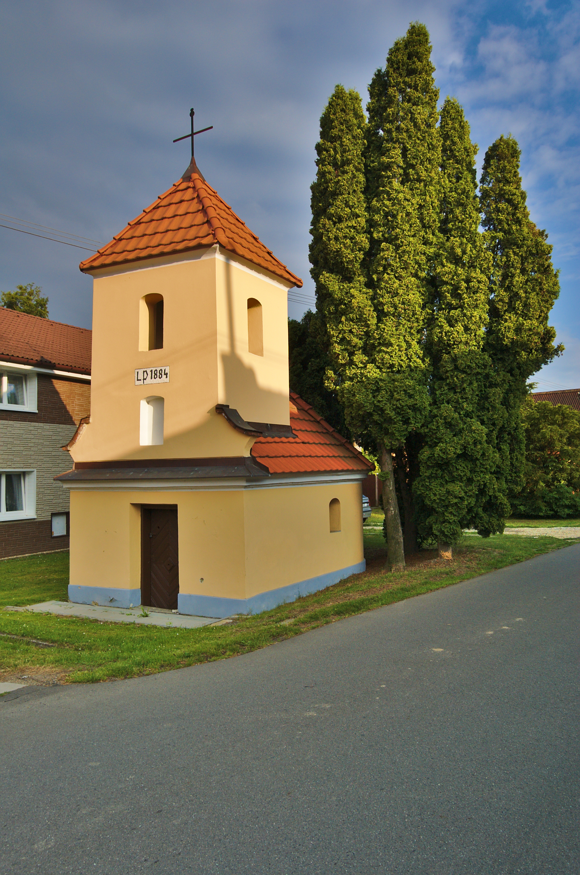 Kaple svaté Anny, Rakodavy, Věrovany, okres Olomouc